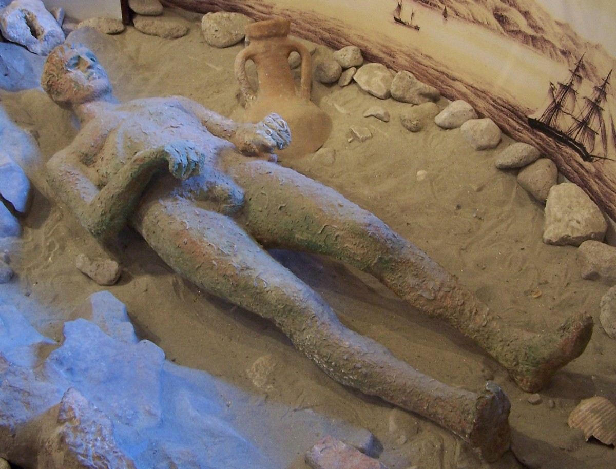 Kroatischer Apoxyomenos, Replik der Bronzestatue in der nachgestellten Auffindesituation